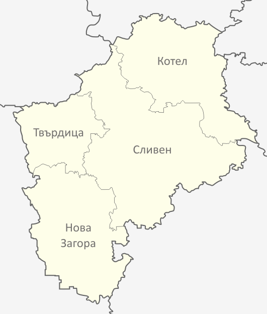 Картата е създадена от Любомир Таушанов